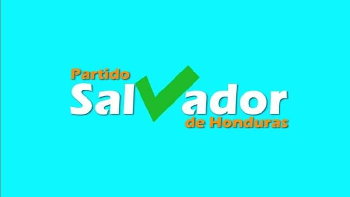 Bandera del Partido politico de Honduras: Partido Salvador de Honduras (PSH)